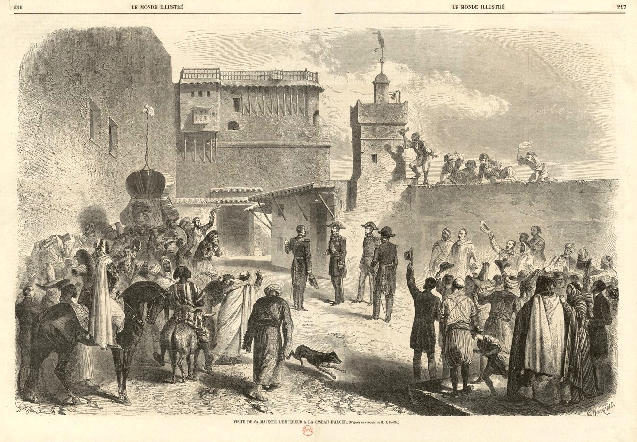 Visite de Sa Majesté l'Empereur à la Casbah d'Alger, : [estampe]